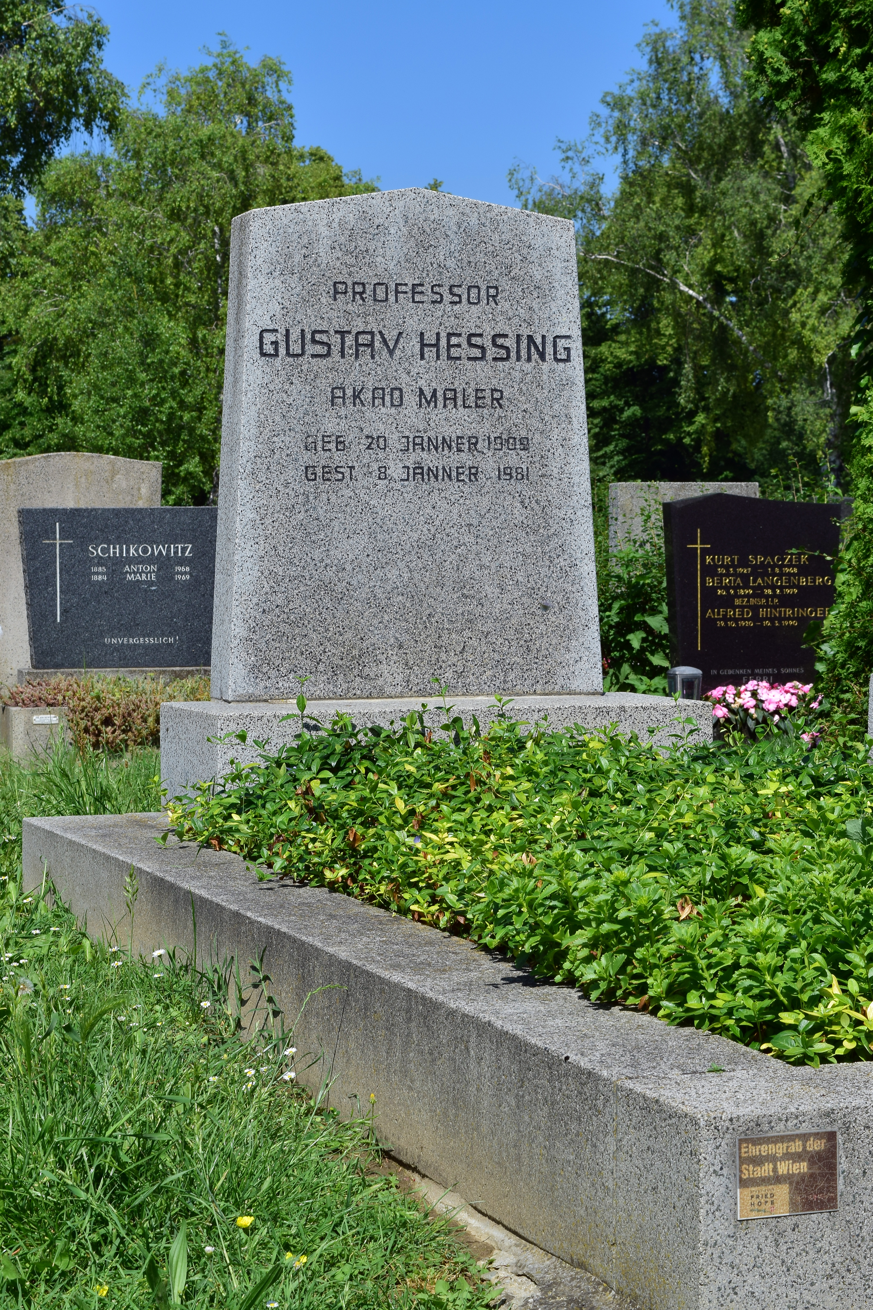 Ehrenhalber gewidmetes Grab von Gustav Hessing auf dem Wiener Zentralfriedhof.